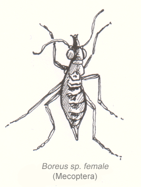 Mecoptera - Boreus sp. - female